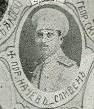 Поручик Петър Начев.